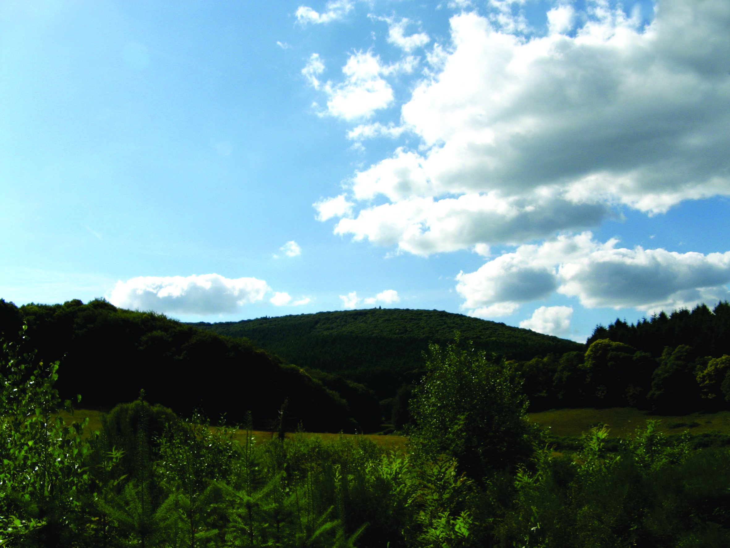 De Mont Beuvray - 821 meter hoog, behorende tot het massief van de Morvan - is een voormalig oppidum en was het centrum van het Keltische volk der Aedui die er hun hoofdstad Bibracte hadden, die in de Ie eeuw v.C haar volle ontwikkeling kende.De berg strekt zich uit over de gemeenten Saint-Léger-sous-Beuvray (Saône-et-Loire), Glux-en-Glenne en Larochemillay (Nièvre) in Bourgondië.